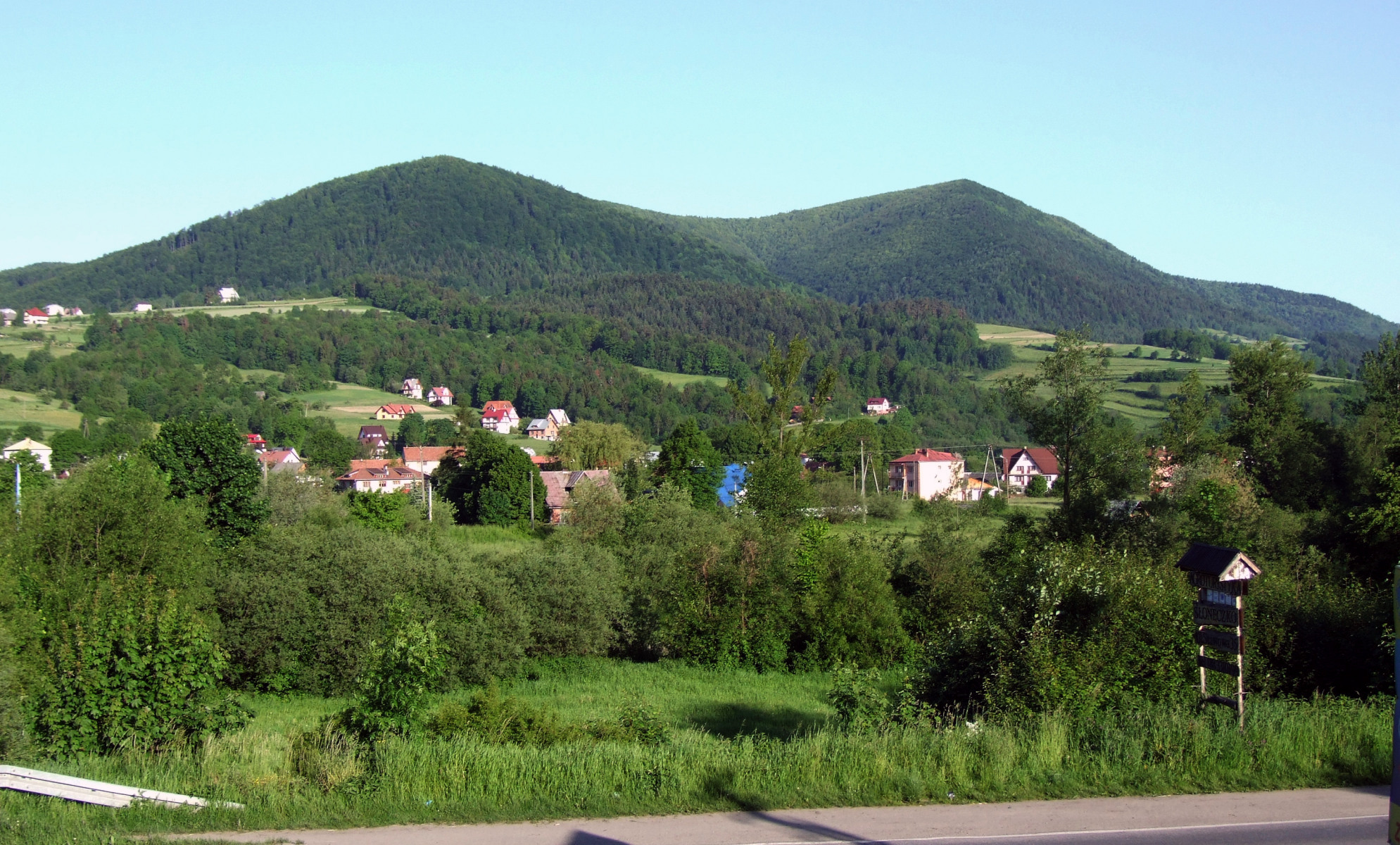 Szczebel, widok z Mszany Górnej